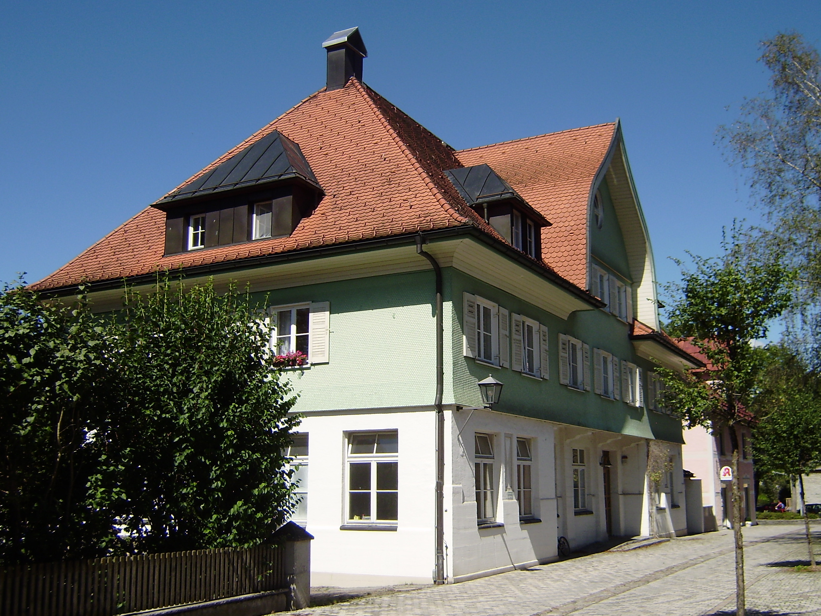 Das schmucke und repräsentative Postamtsgebäude in der Bahnhofstraße 7 in Weiler im Allgäu wurde 1912 von Architekt und Baumeister Georg Bufler fertiggestellt und dient heute als Wohnhaus.